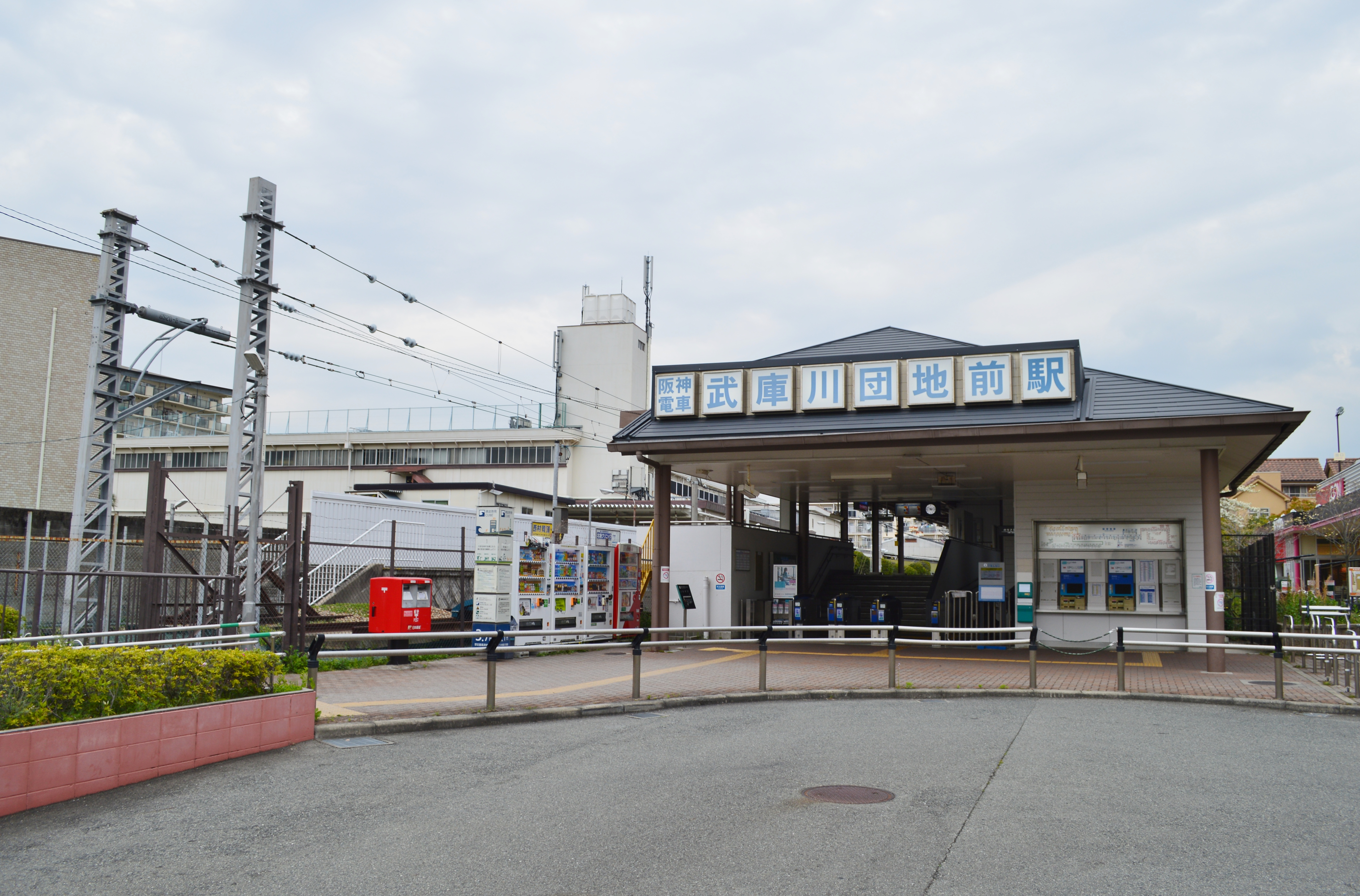 武庫川団地前駅 駅舎